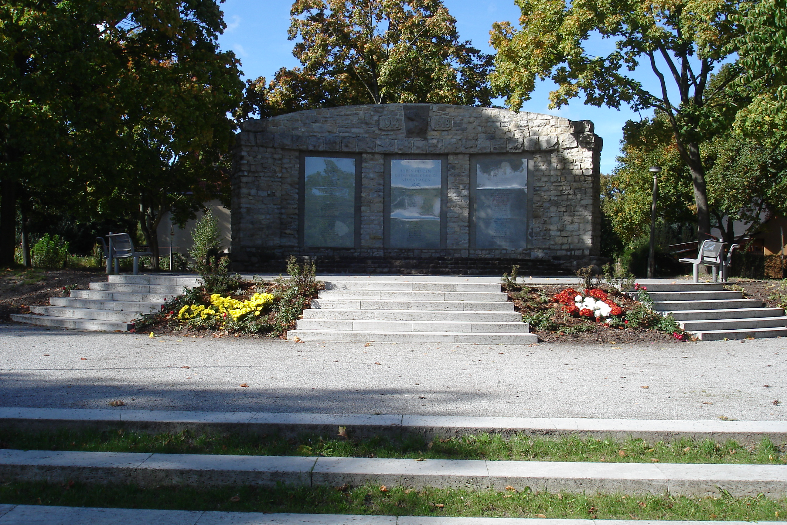 1924 auf dem Platz der Republik (ehem. Wilhelmplatz) eröffnetes Denkmal für die Opfer des 1. Weltkrieges